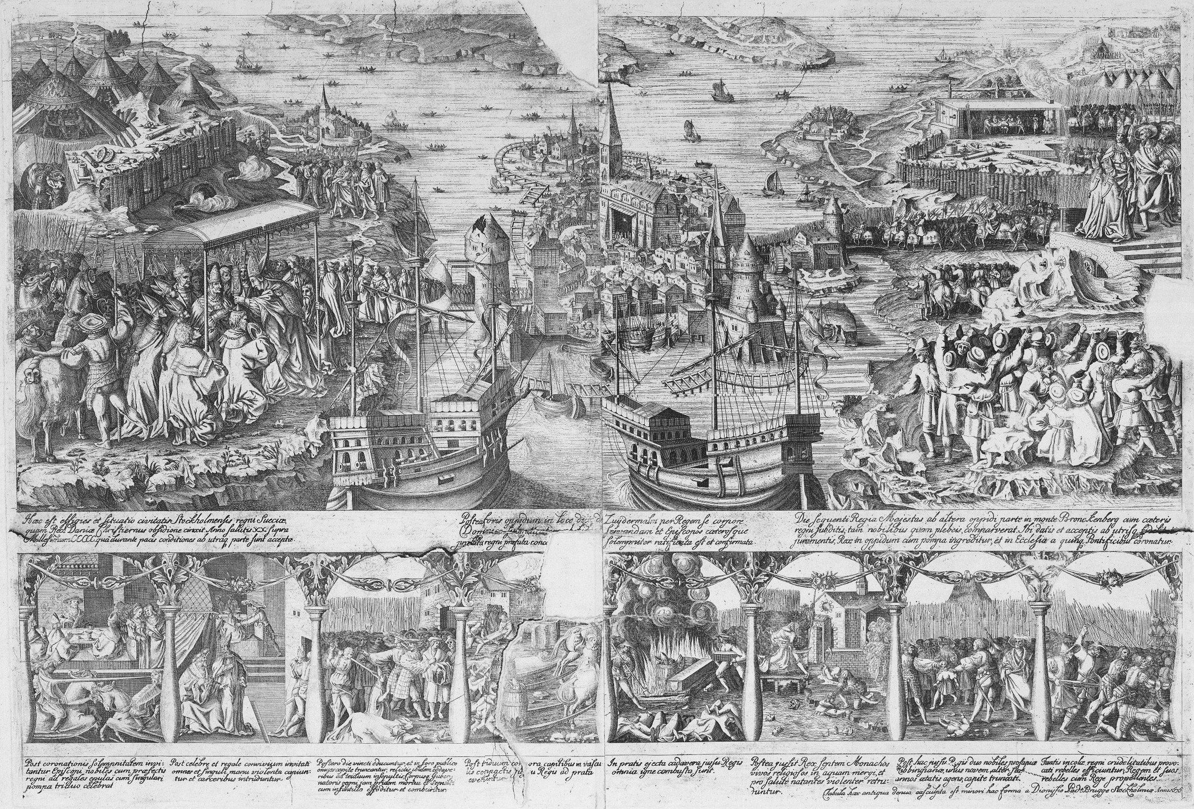 Blodbadsplanschen